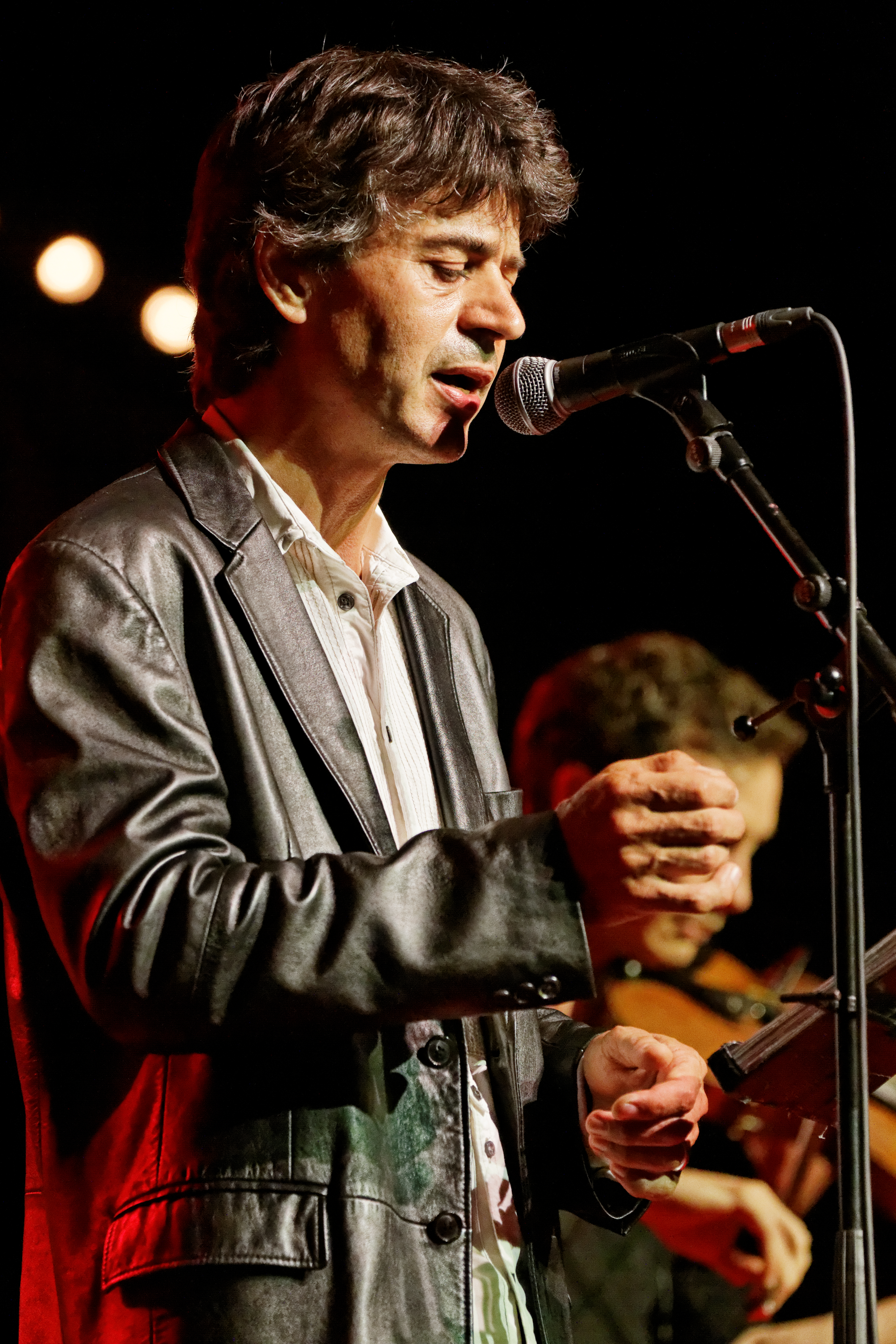 Denez Prigent en concert sur la scène Gradlon lors du festival de Cornouaille 2014.